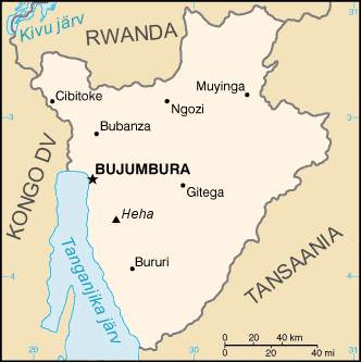 Burundi kaart